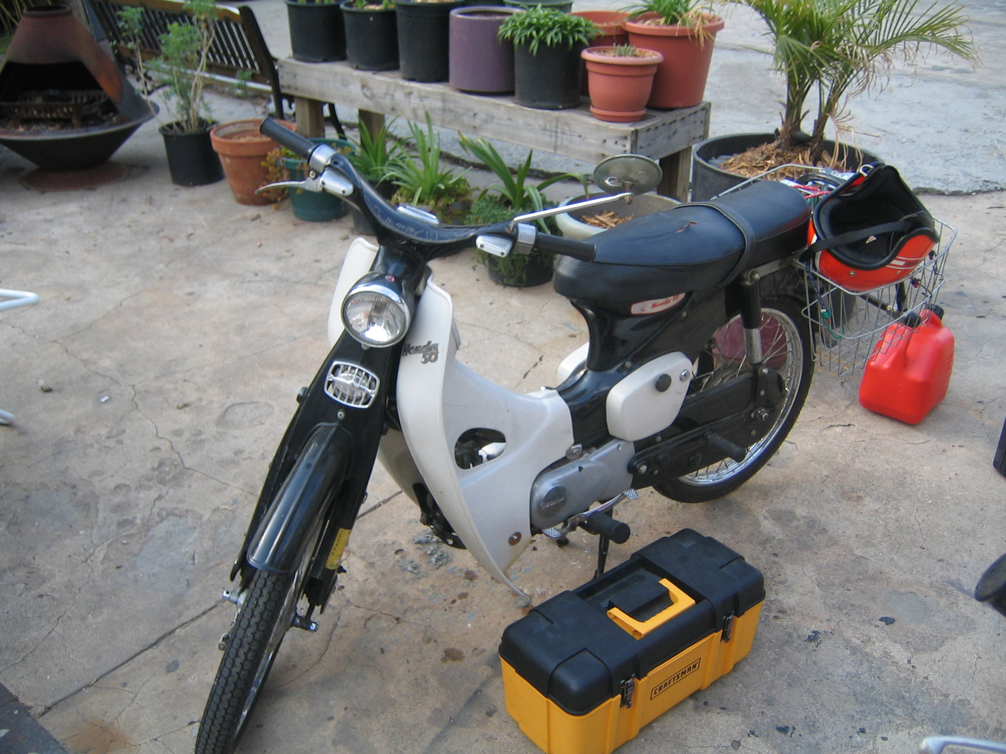 Travis' C100